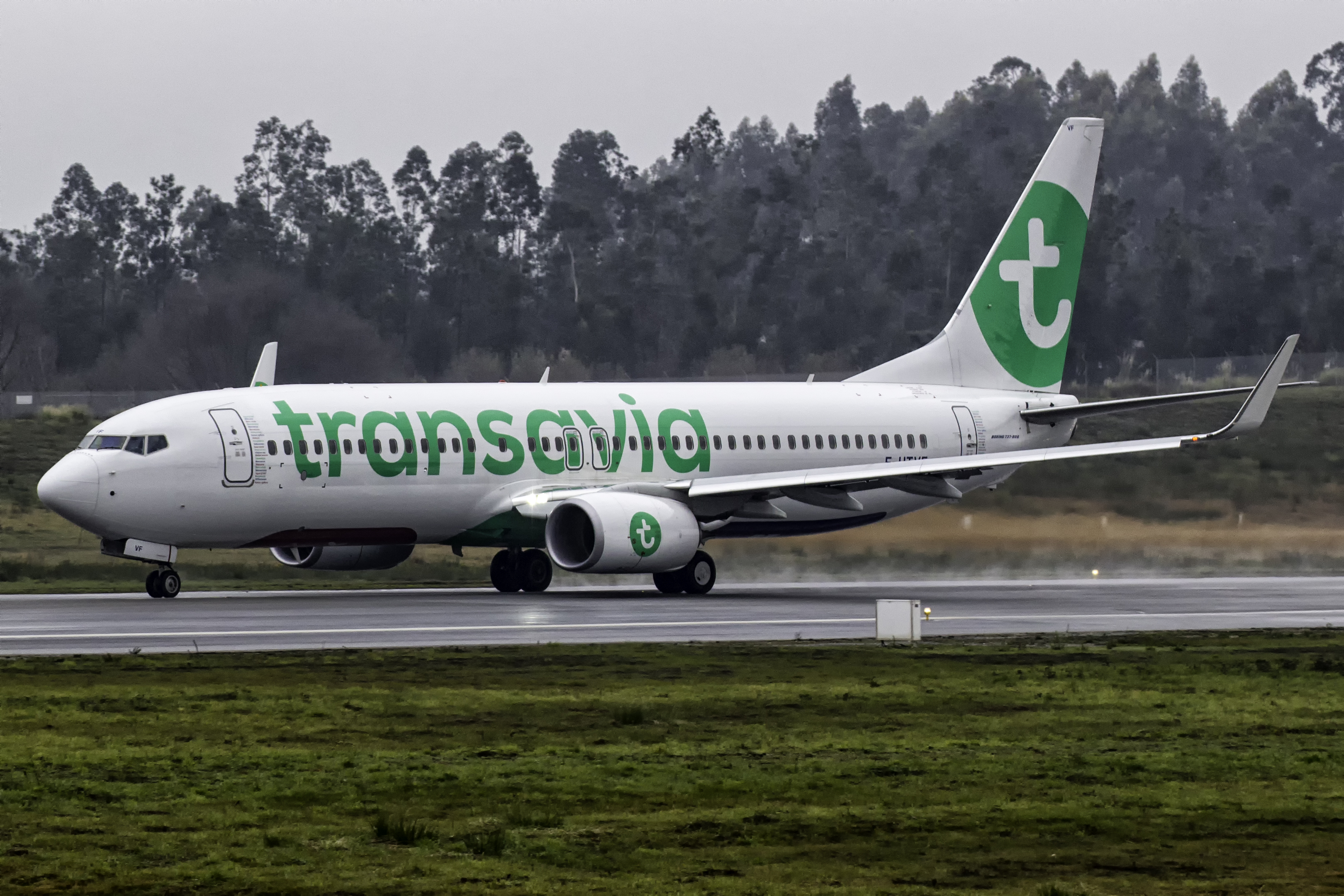 Boeing 737 de Transavia France despegando do aeroporto do Porto.